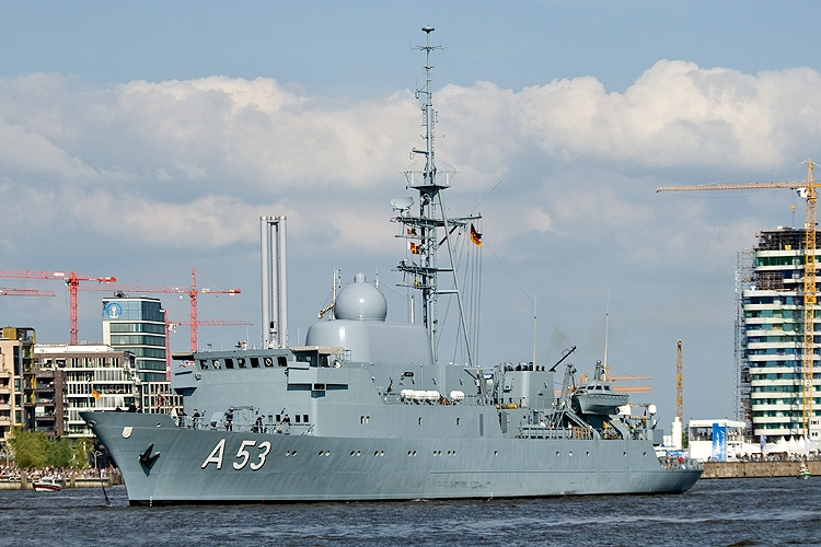 Die Oker (A 53) ist ein 1989 in Dienst gestelltes Flottendienstboot der Oste-Klasse (423) der Deutschen Marine. Aufgenommen während der Auslaufparade des 820. Hamburger Hafengeburtstages.